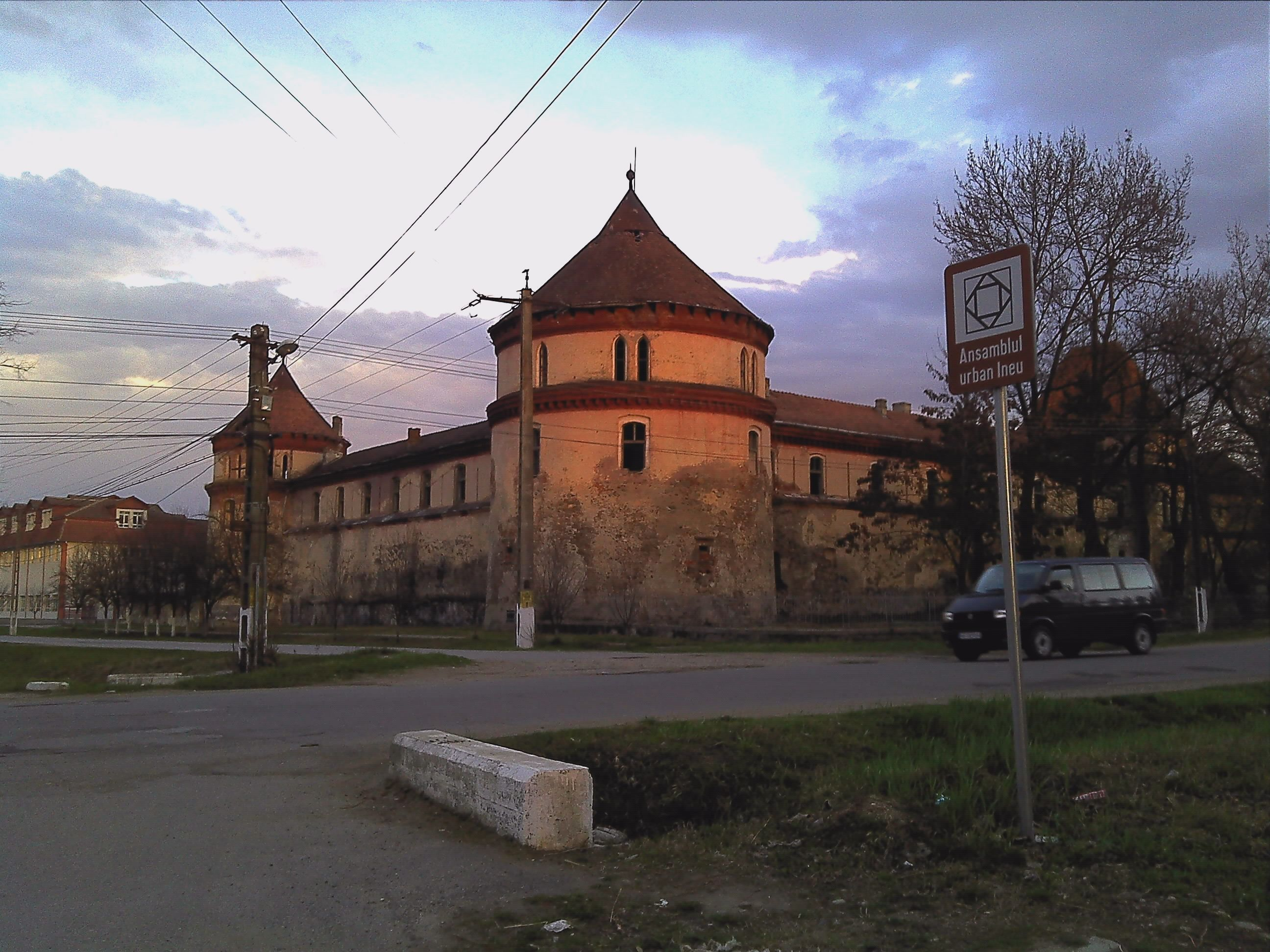 Monument istoric care caracterizeaza orasul. A fost construita probabil prin secolul 13.